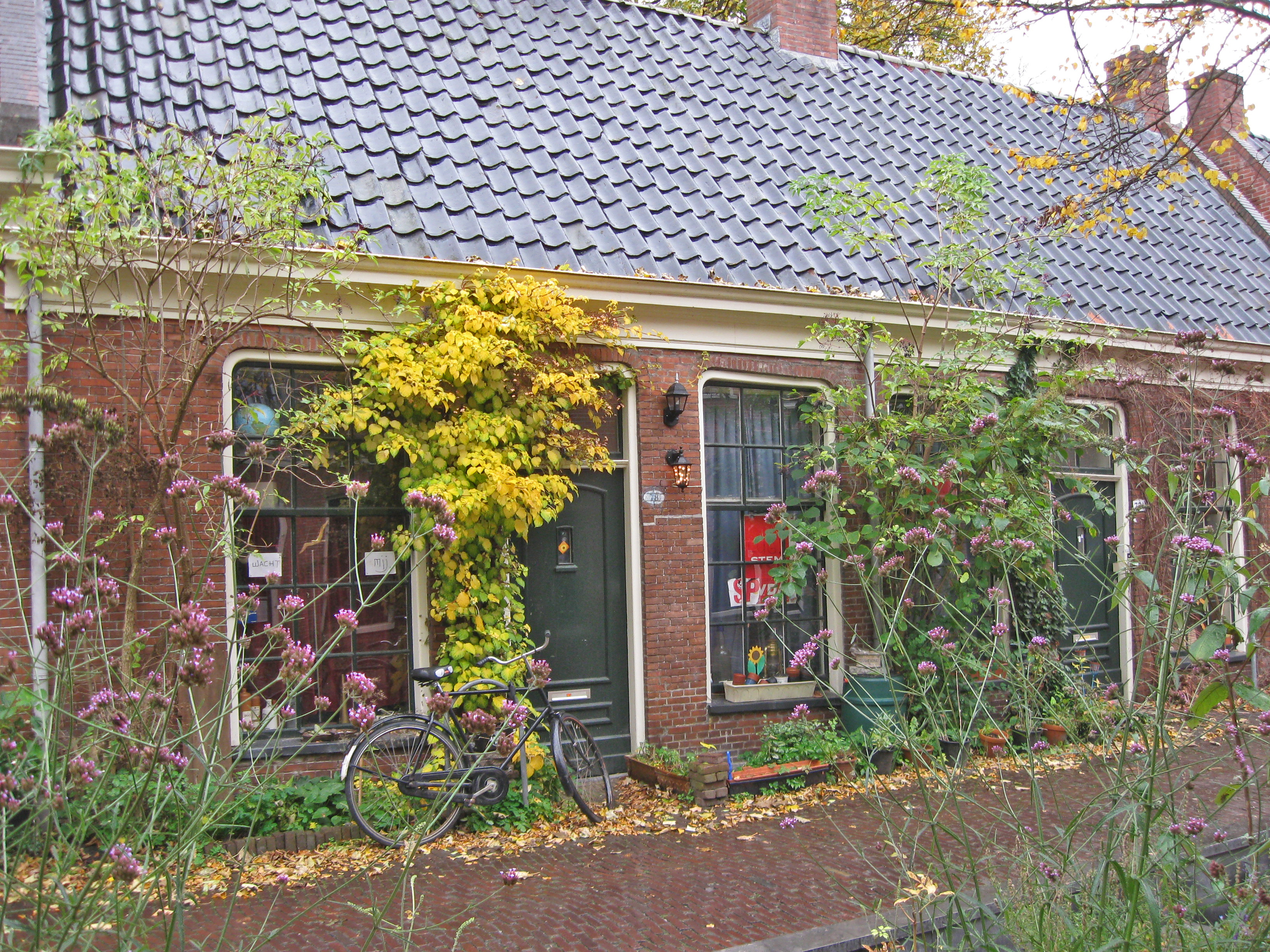 Groningen, Grote Rozenstraat 76-84, Gerarda Gockingagasthuis, 1870; rm 485632